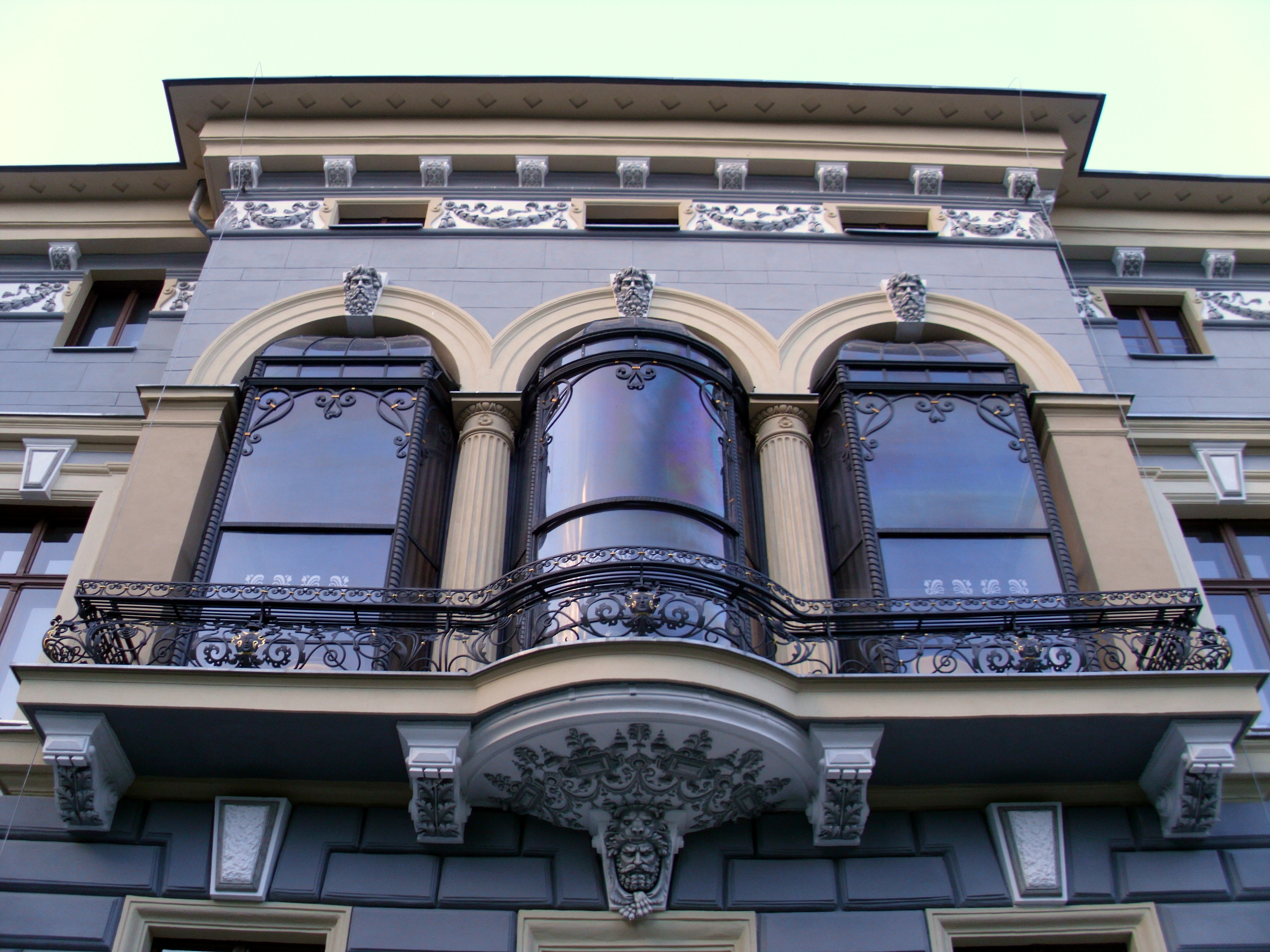 Prudnik, ul. Kościuszki, willa, ob. dom kultury, k. XIX